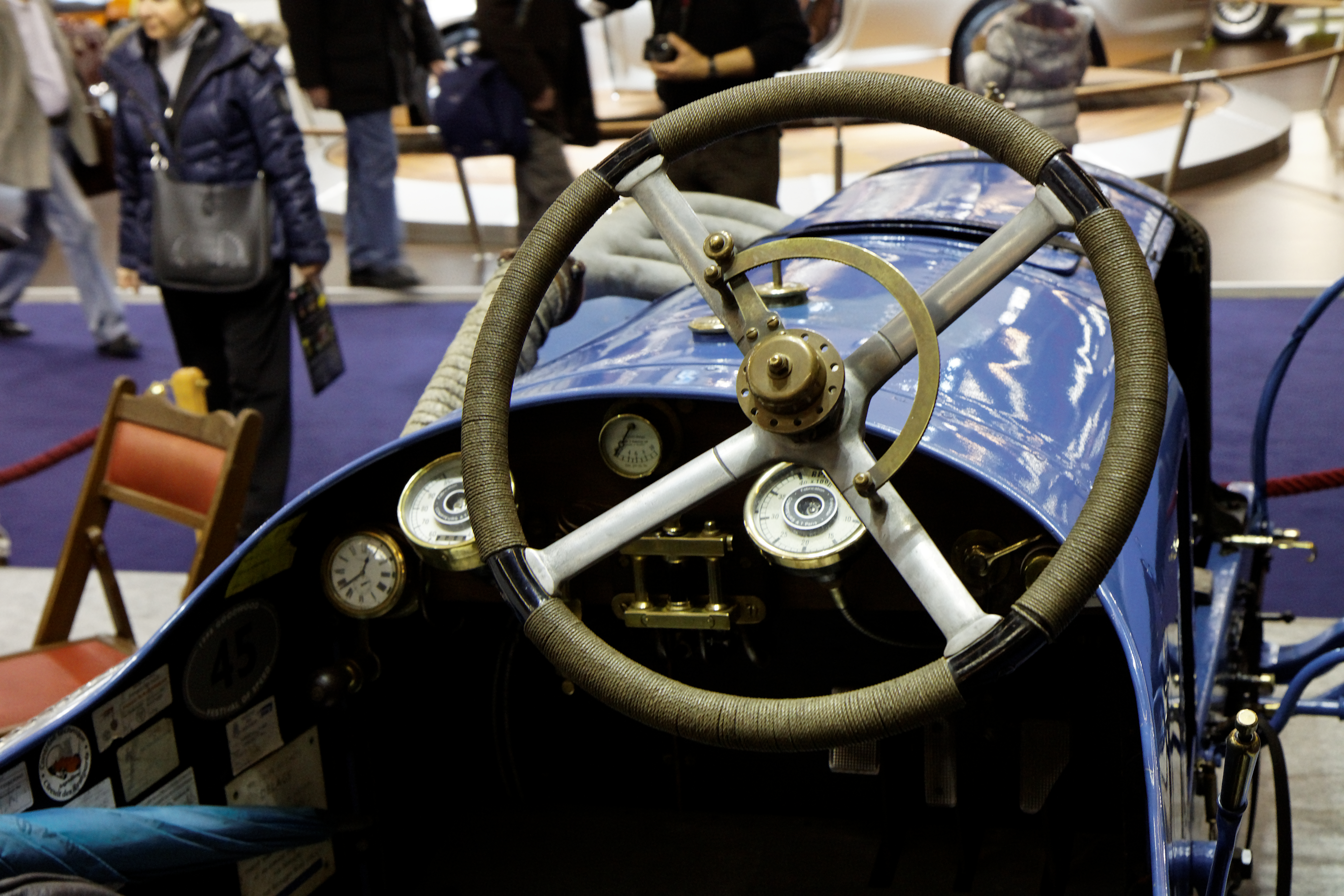 Photographie prise lors du salon rétromobile 2011 à Paris, porte de Versailles.